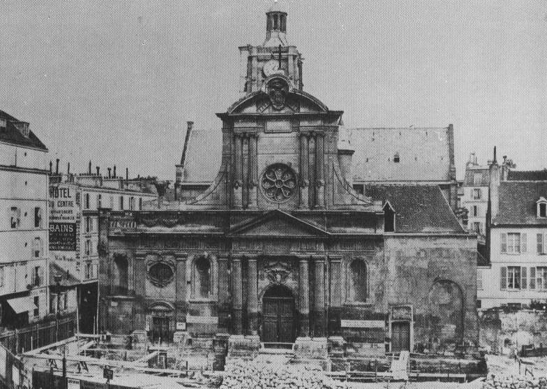 église Saint-laurent de Paris avant la restauration de 1861